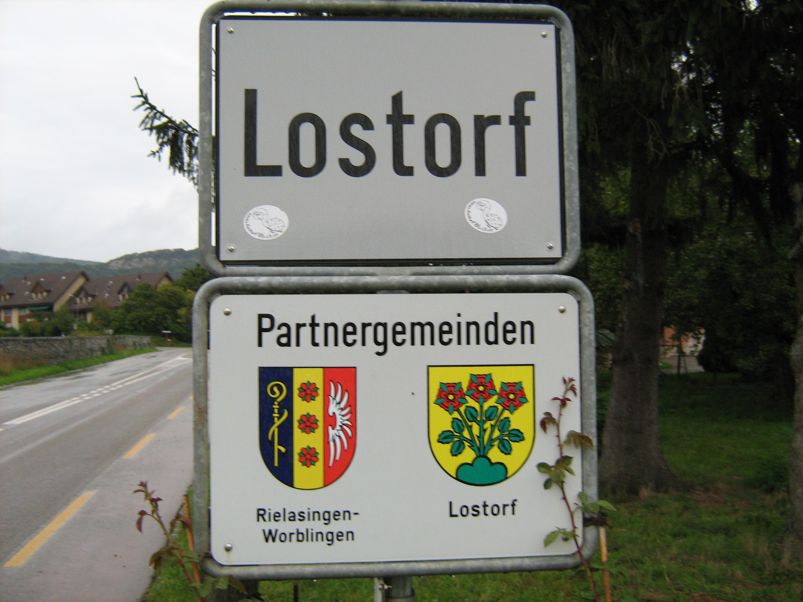 Lostorf Ortsschild (Schweiz) in nähe von Olten